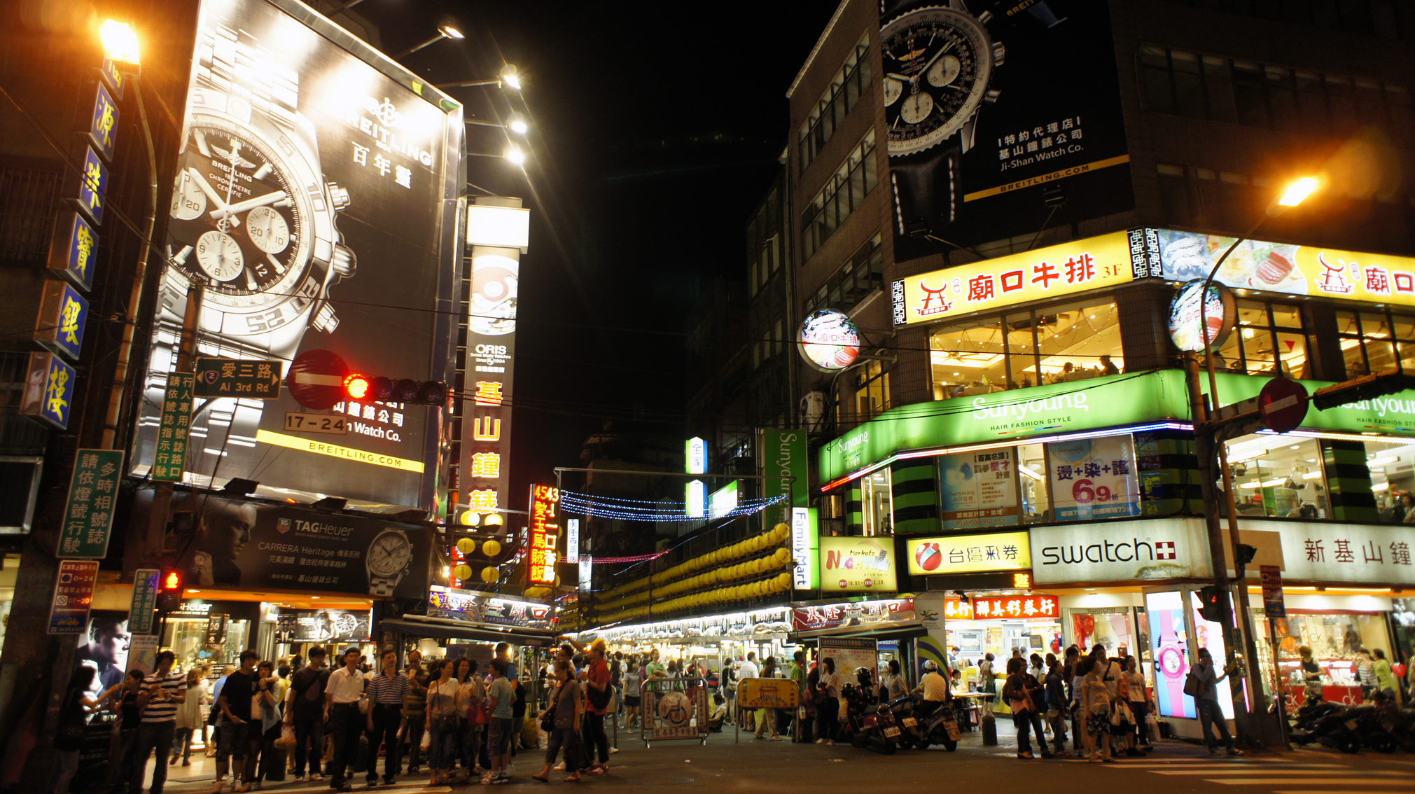 基隆市廟口夜市愛三路入口